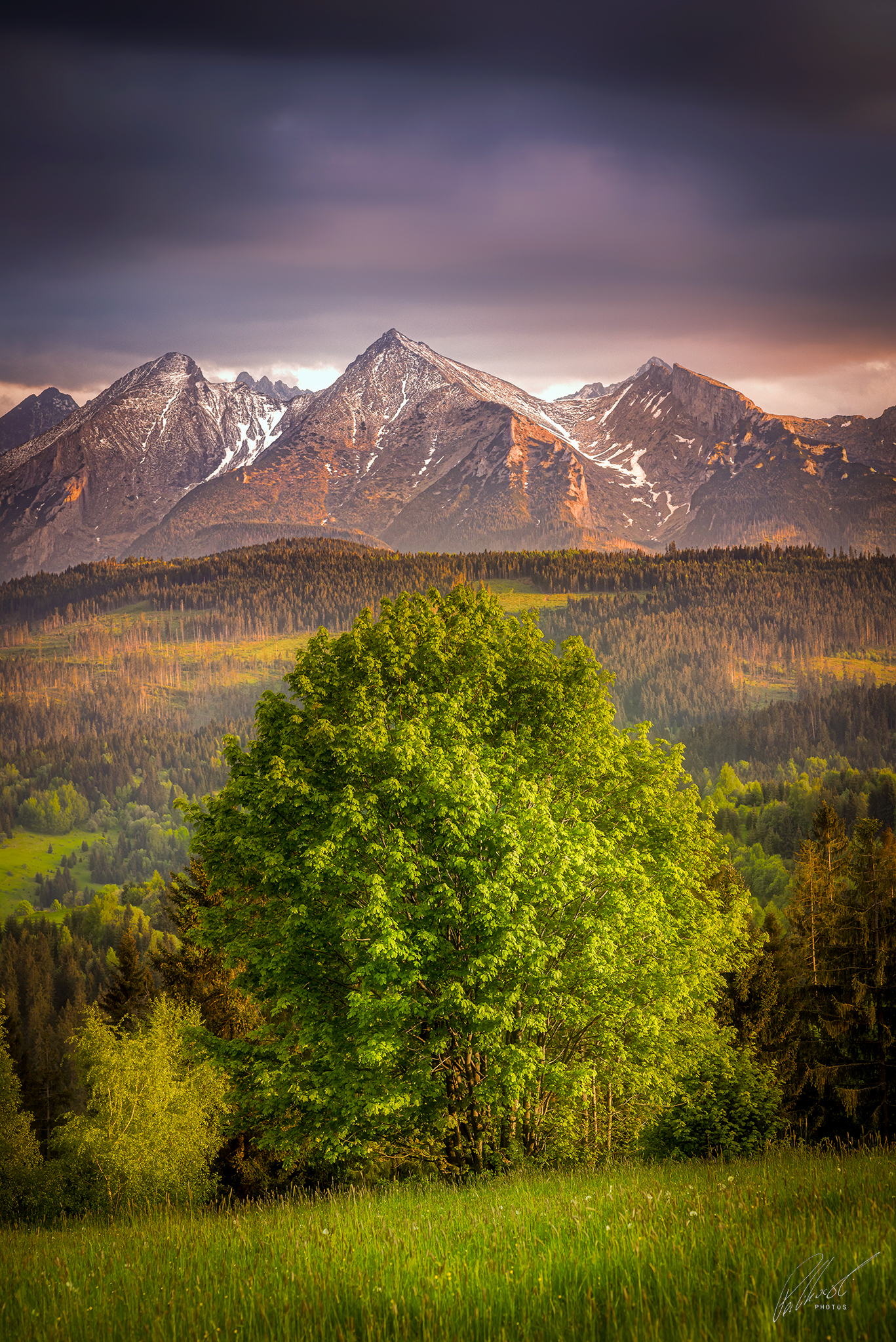 Obszar specjalnej ochrony ptaków Tatry. This is a photography of Natura 2000 protected area with ID PLC120001